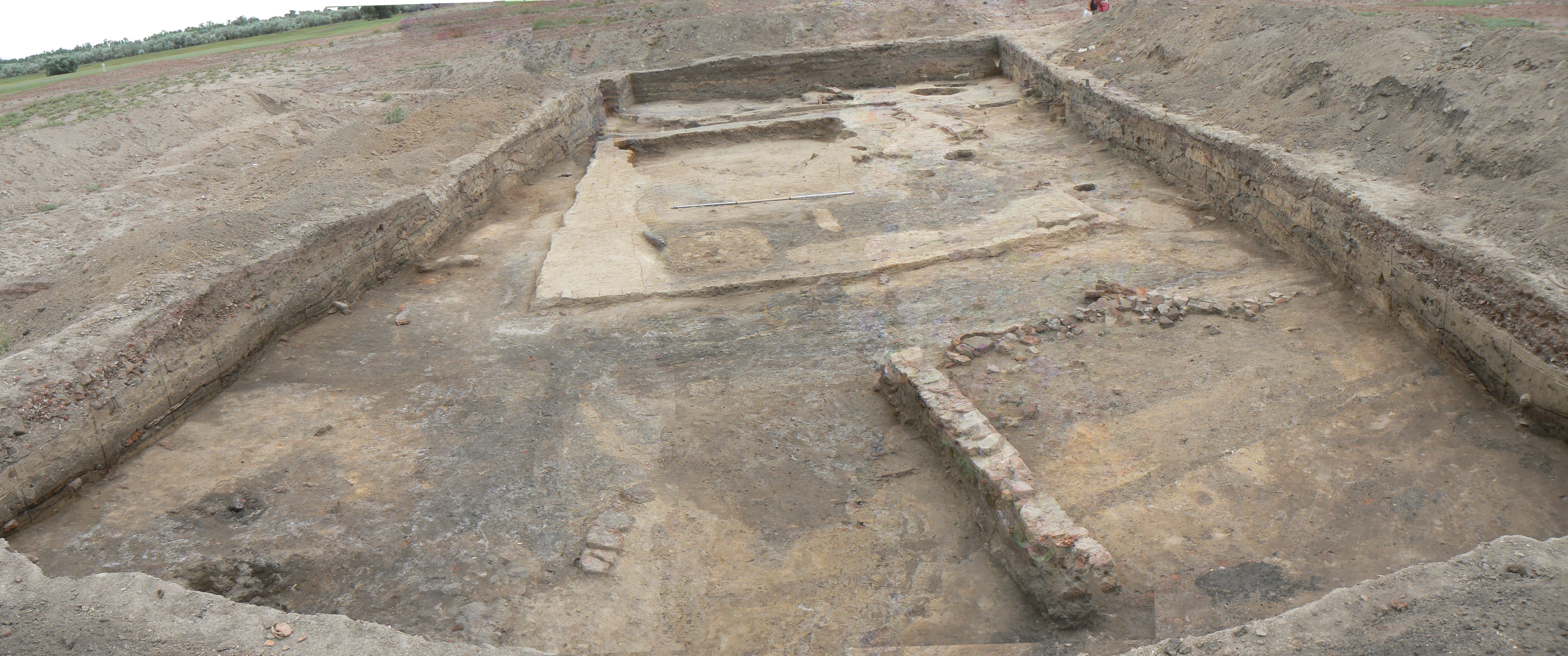 Самосдельское городище 2008 раскоп №2 вид с юга